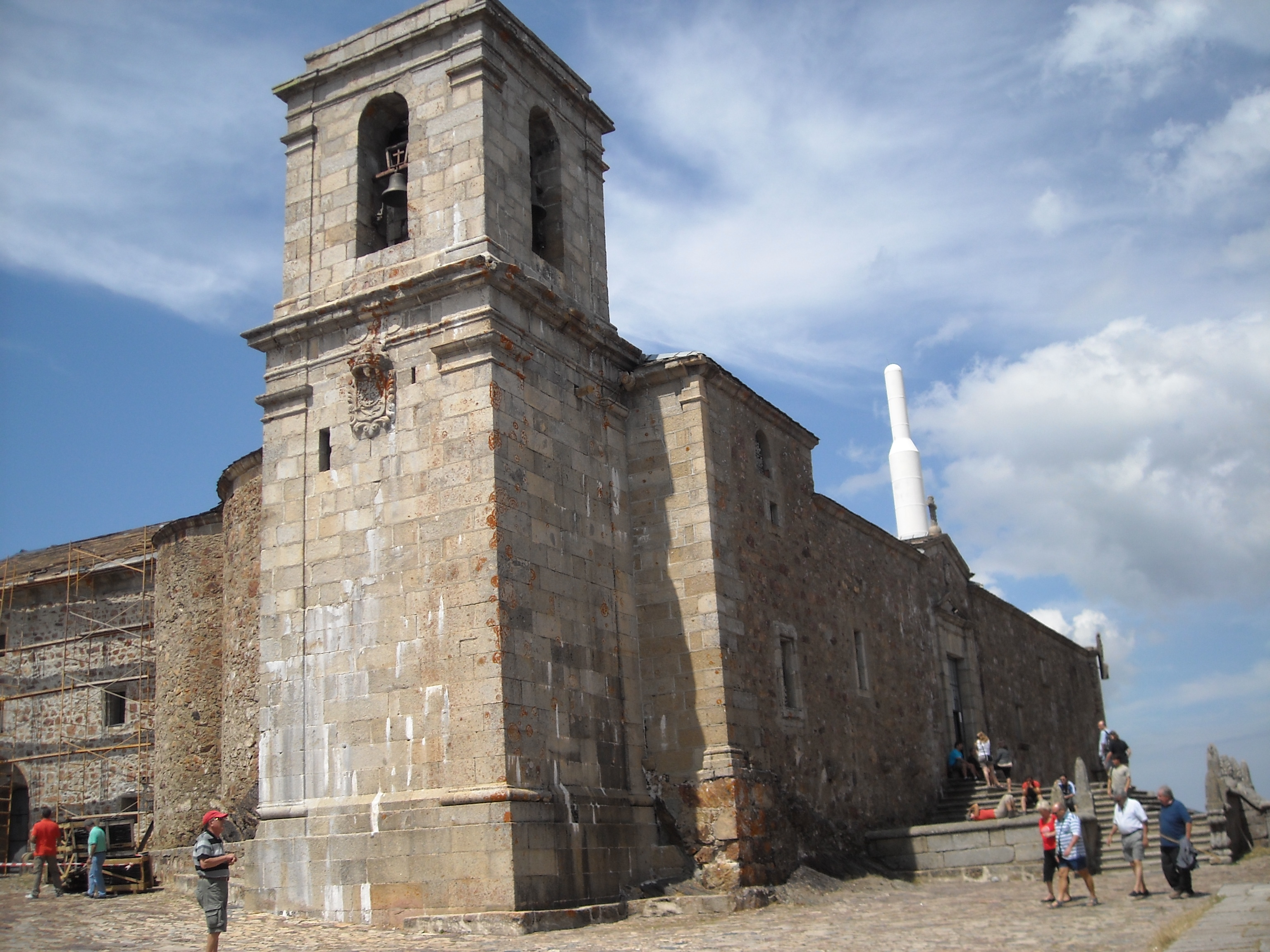 Santuario de Nuestra Señora de la Peña de Francia, El Cabaco, Salamanca, España